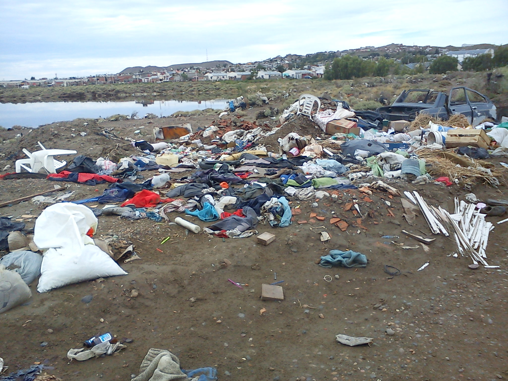 Basureros clandestinos a la veda del humedal